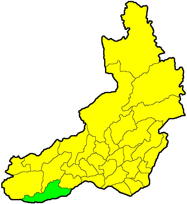 Кыринский район на карте Забайкальского края